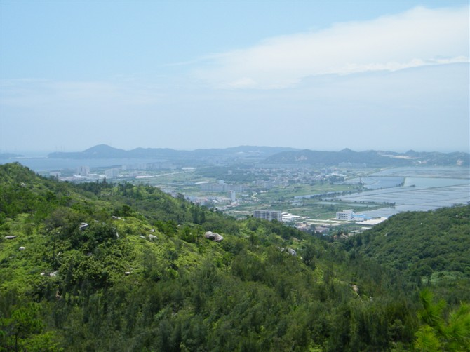 在大瞭望山望广澳 、汕头保税区等